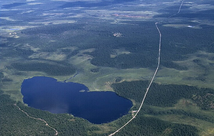 Rikti-Dockasträsket i bildens nedre del. Motiv: Rikti-Dockas Nyckelord: Flygbilder, Riksintressen Kategori: Fjällbygd Rikti-Dockasträsket i bildens nedre del.